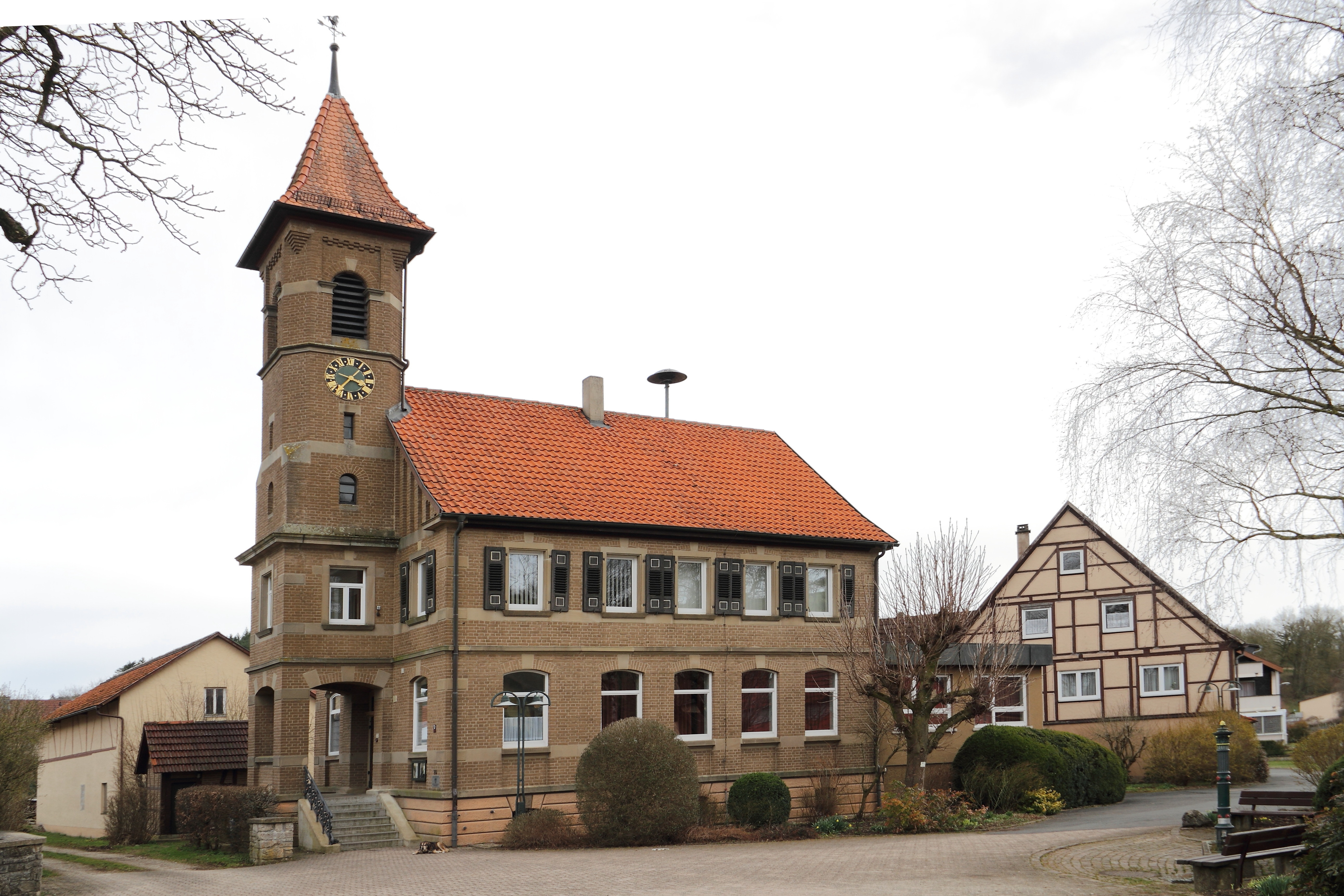 Das denkmalgeschützte ehemalige Rathaus und Schulgebäude im Niederstettener Ortsteil Herrenzimmern.